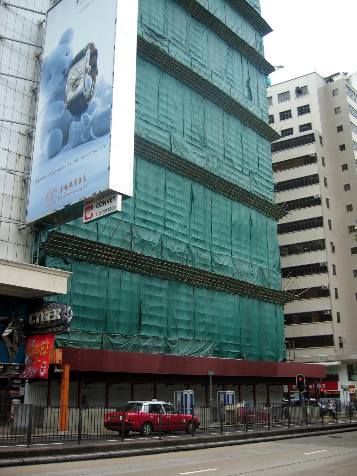 Tung Ying Building Site 正在拆卸的東英大廈